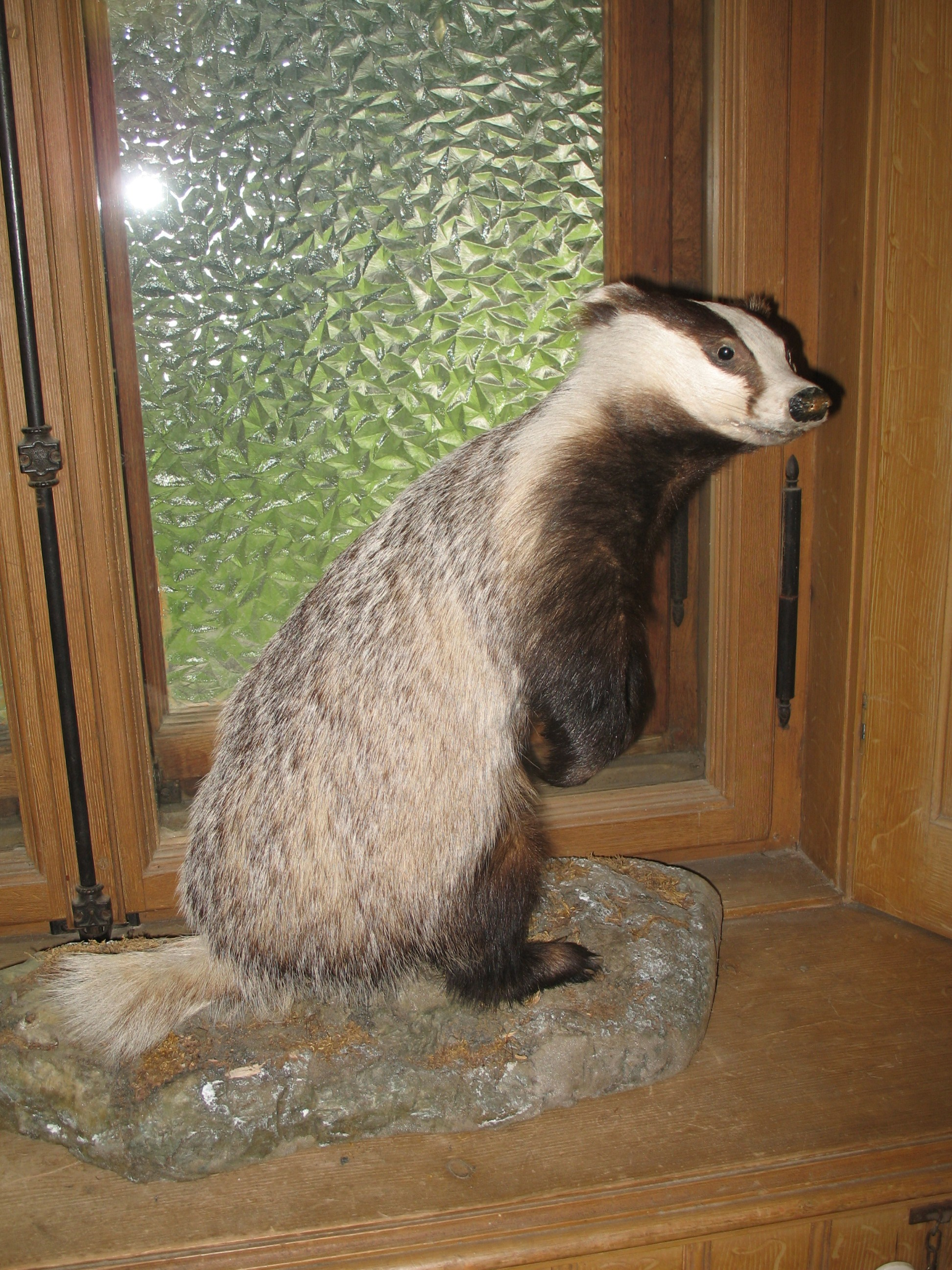 Immagine da Gressoney-Saint-Jean, Val d'Aosta - Museo Regionale della Fauna Alpina - Alpenfaunamuseum "Beck-Peccoz" - meles meles